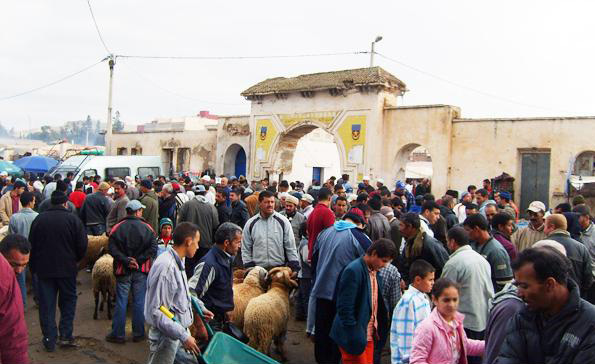 Arouit